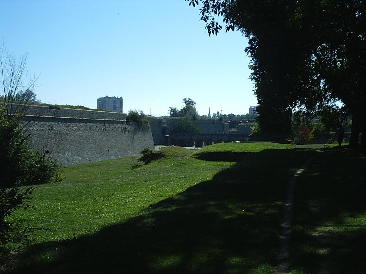 Vuelta del Castillo. Vista exterior de la Ciudadela.